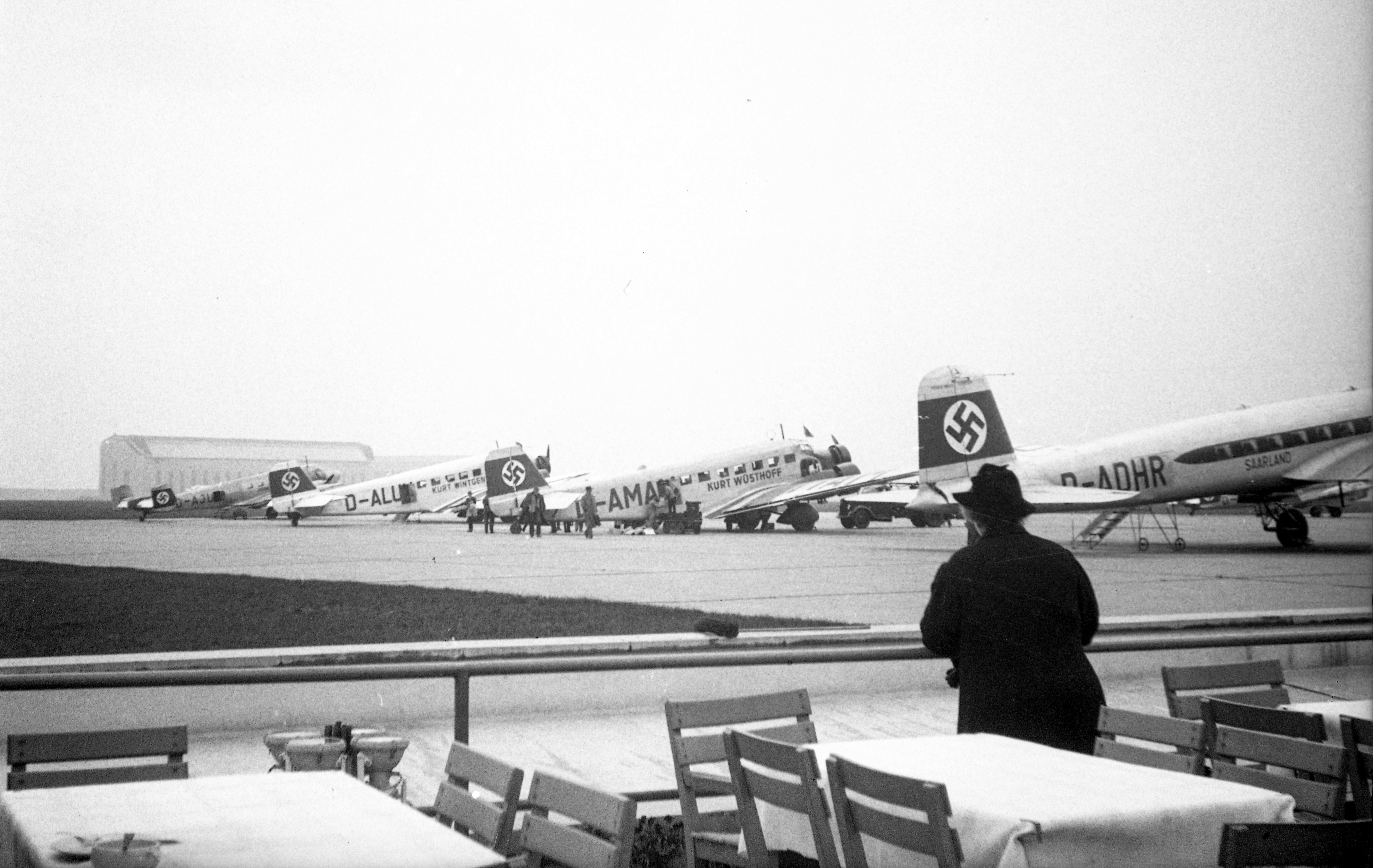 repülőtér, a háttérben egy Zeppelin hangár. Location: Germany Tags: airport, airplane, swastica, Gerrman brand, Junkers-brand, Focke-Wulf-brand, hangar Title: repülőtér, a háttérben egy Zeppelin hangár.